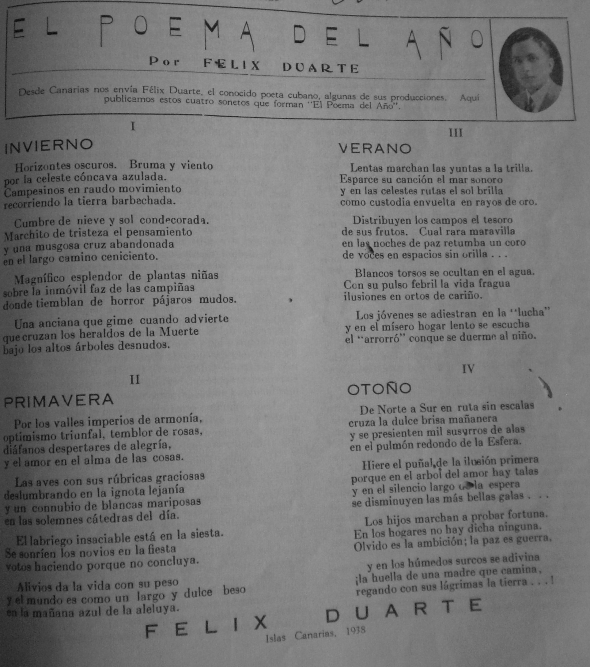 El poema del año, Felix Duarte